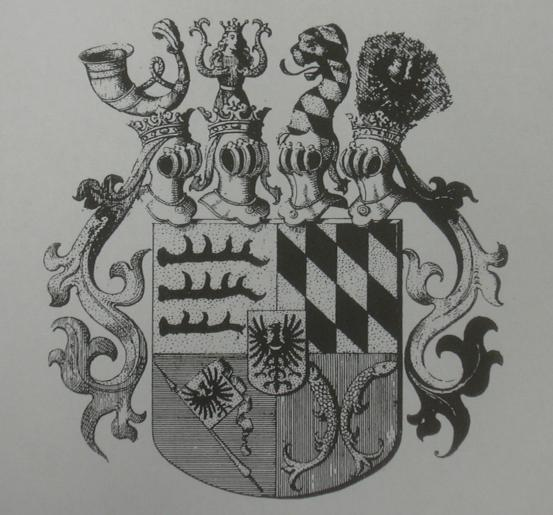 de: Wappen der Herzöge von Württemberg-Oels en: Coat of arms of the dukes of Württemberg-Oels